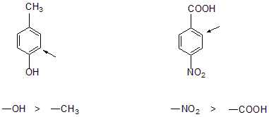 中文（中国大陆）: 两个同一类定位基的定位效果